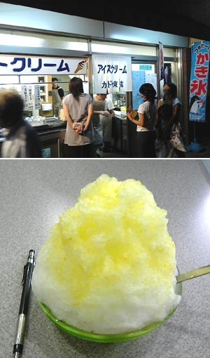 Kakigori a japaneese desert.